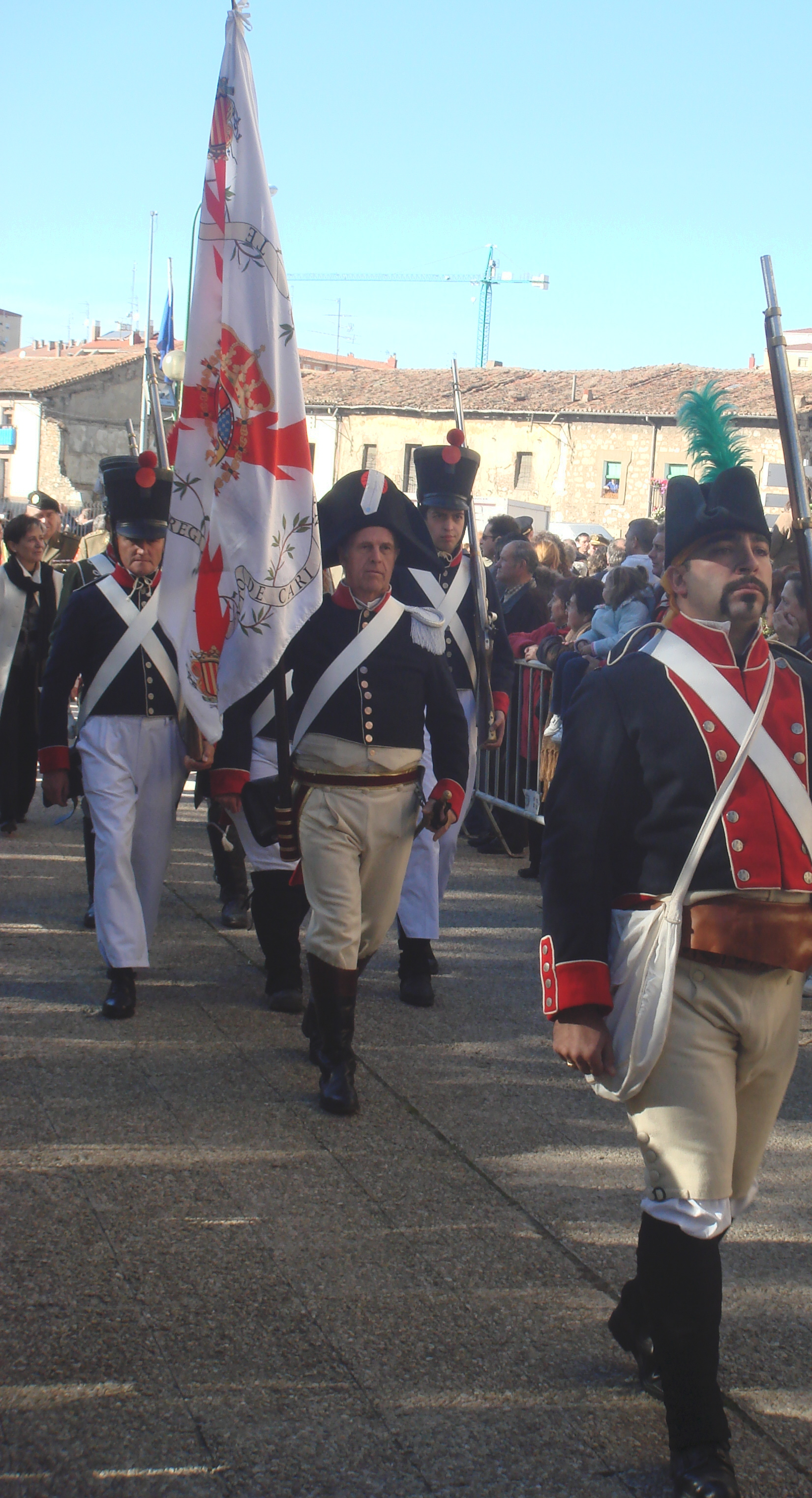 Conmemoración de la Batalla de Gamonal, Burgos, España, 2007.